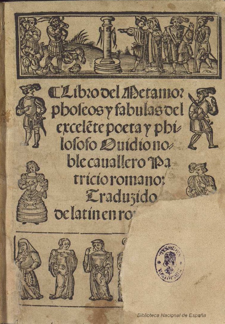 Portada de "Libro del Metamorphoseos y fabulas del excelēte poeta y philosofo Ouidio noule cauallero Patricio romano ; traduzido de latín en romançe". Primera traducción castellana de las Metamorfosis de Ovidio hecha por Jorge de Bustamante, s.l., s.n., 1542. Biblioteca Nacional de España.